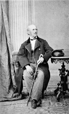 Hermann_Anschütz_(1805-1880) ein deutscher Maler.